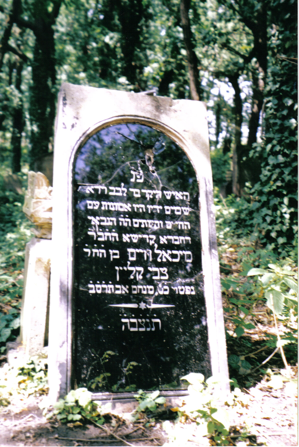 Nagrobek z tablicą z czarnego szkła, cmentarz żydowski w Skwierzynie, woj. lubuskie.